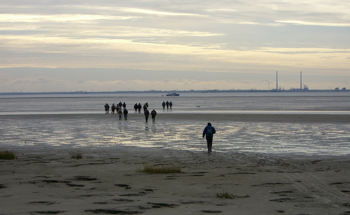 Mellum und Hafenanlagen Wilhelmshaven